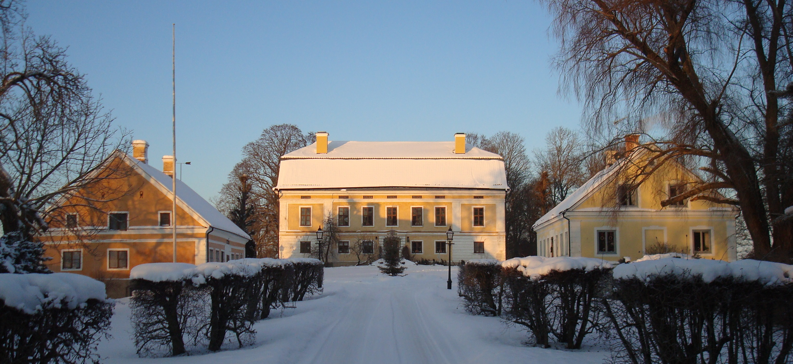 Äs herrgård, Julita socken, Södermanland.